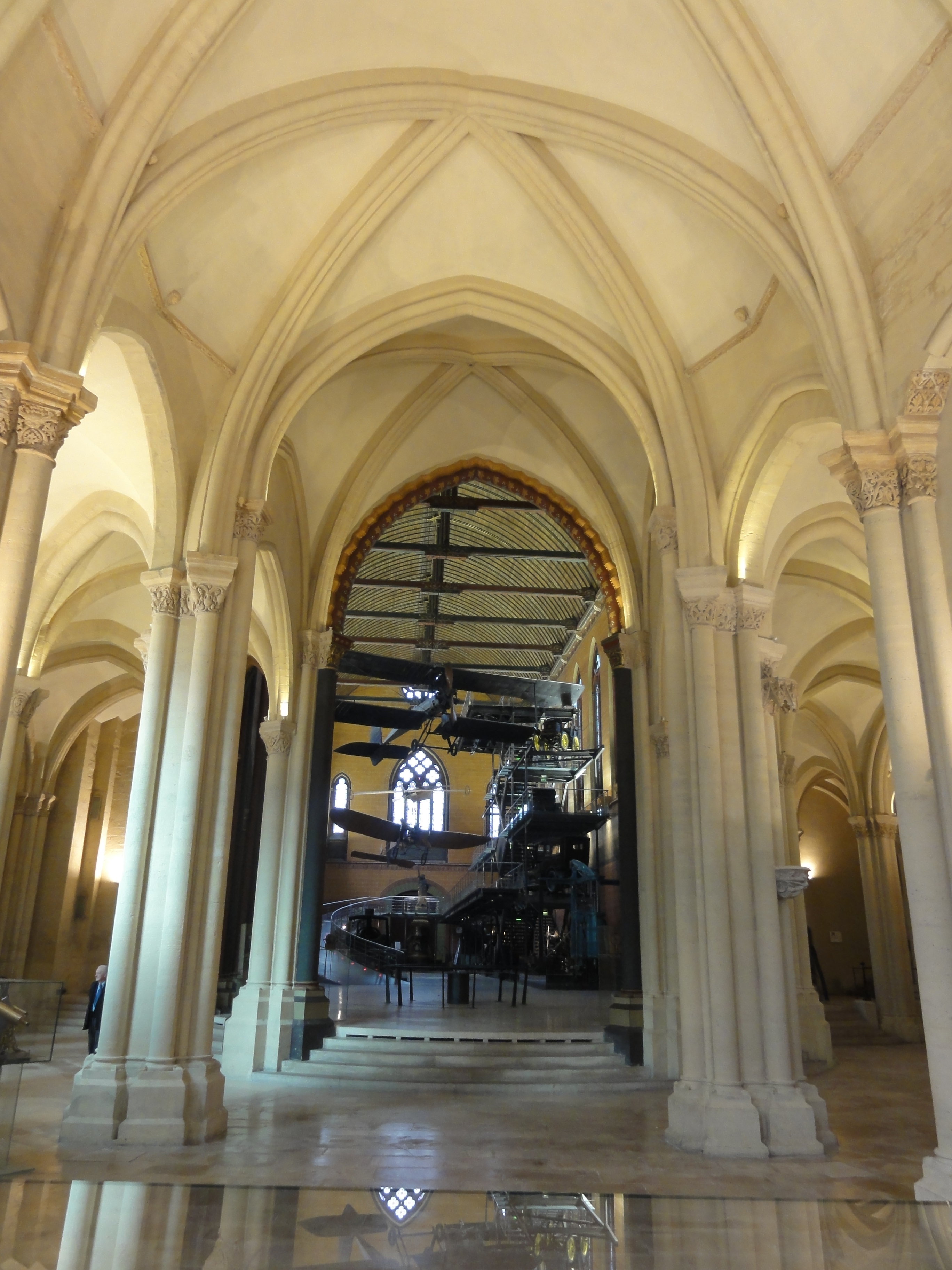 Chapelle d'axe, vue vers l'ouest.